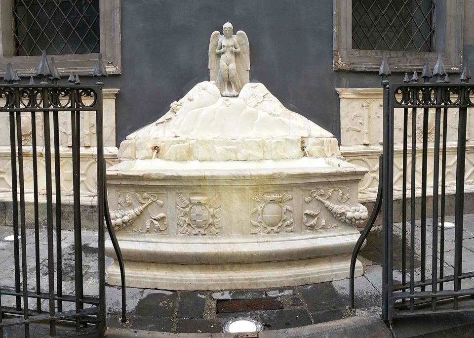 nuova foto restauro